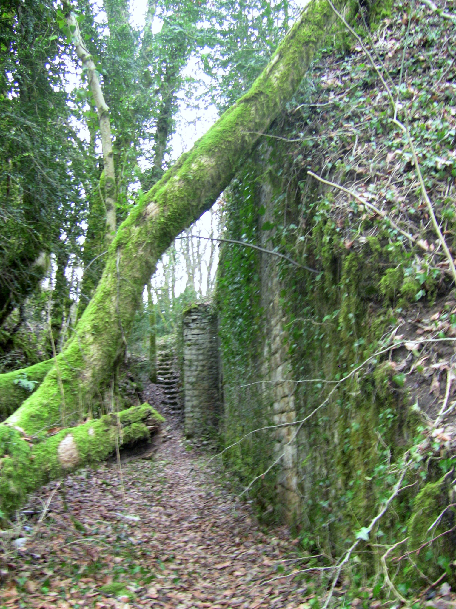 Caserne annexe sud-ouest du fort de Planoise, à Besançon (Doubs, France)